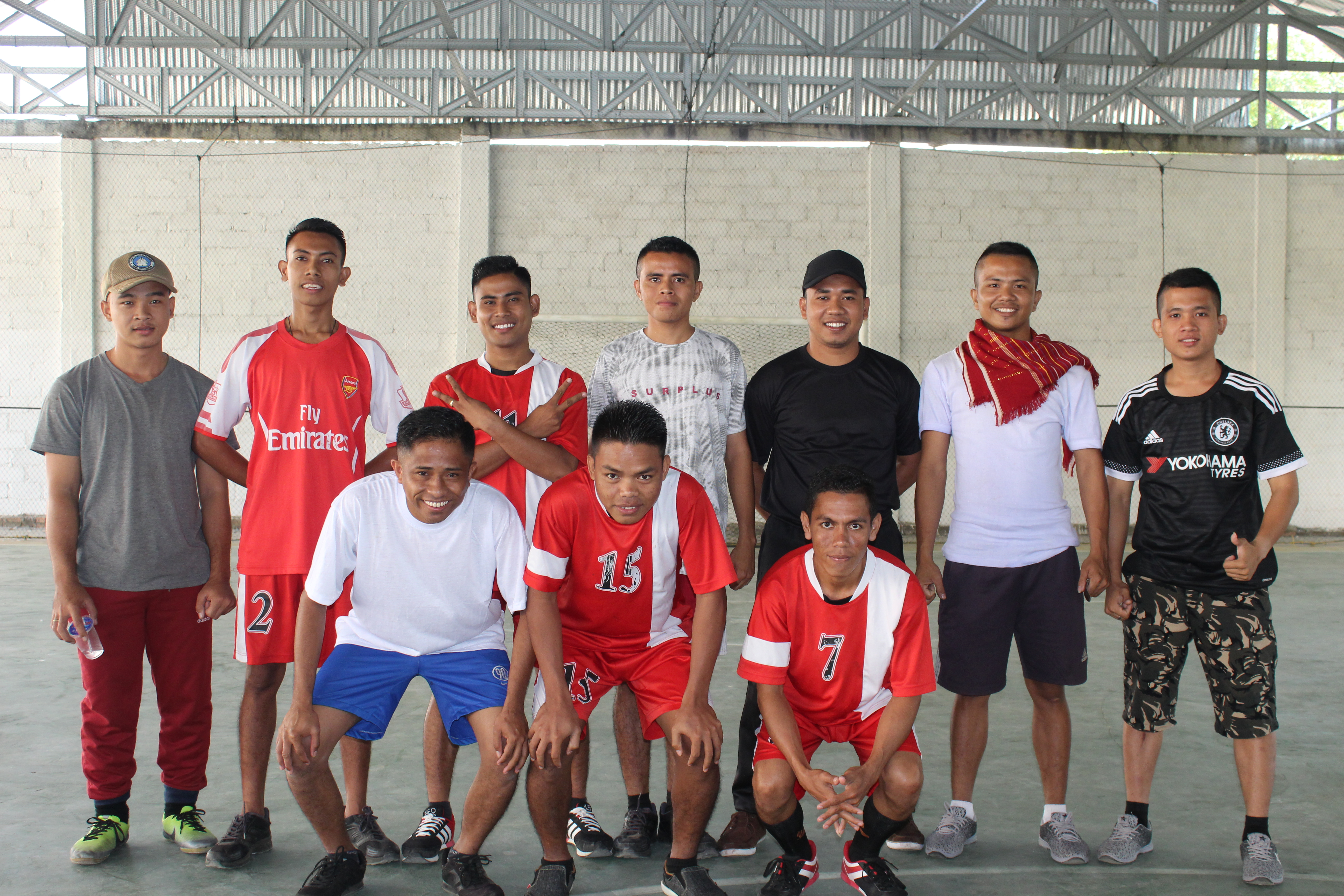 Selesai pertandingan Futsal